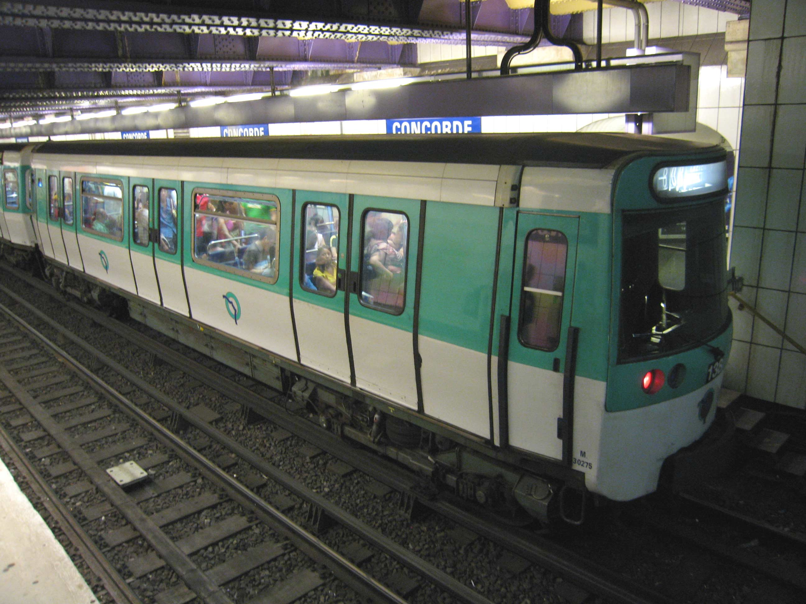 Métro de Paris Rame MF77 sur la ligne 8 a la station Concorde Lieu : Paris, France Date : Juin 2006 Auteur : Pline photo personnelle